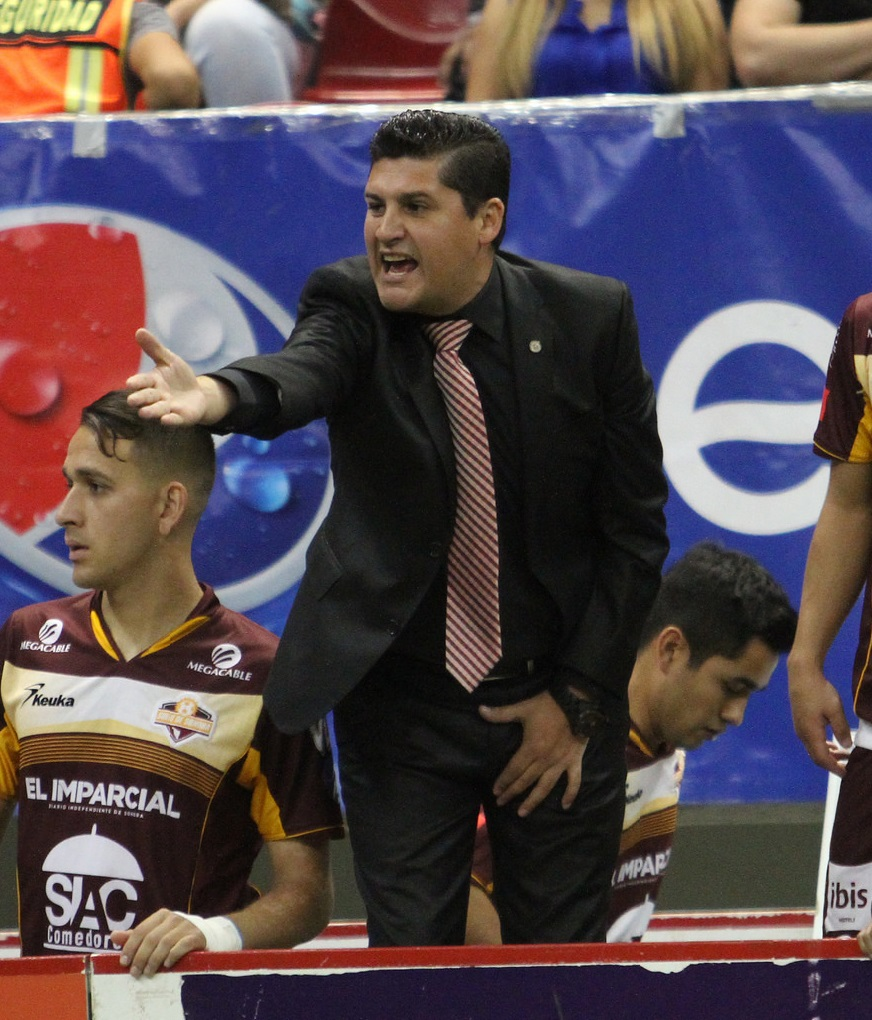 Jose Luis Treviño